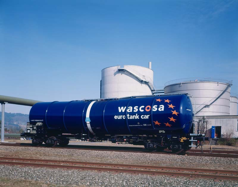 WASCOSA tank car® – der europaweit kom-patible Kesselwagen für die petrochemische und chemische Industrie